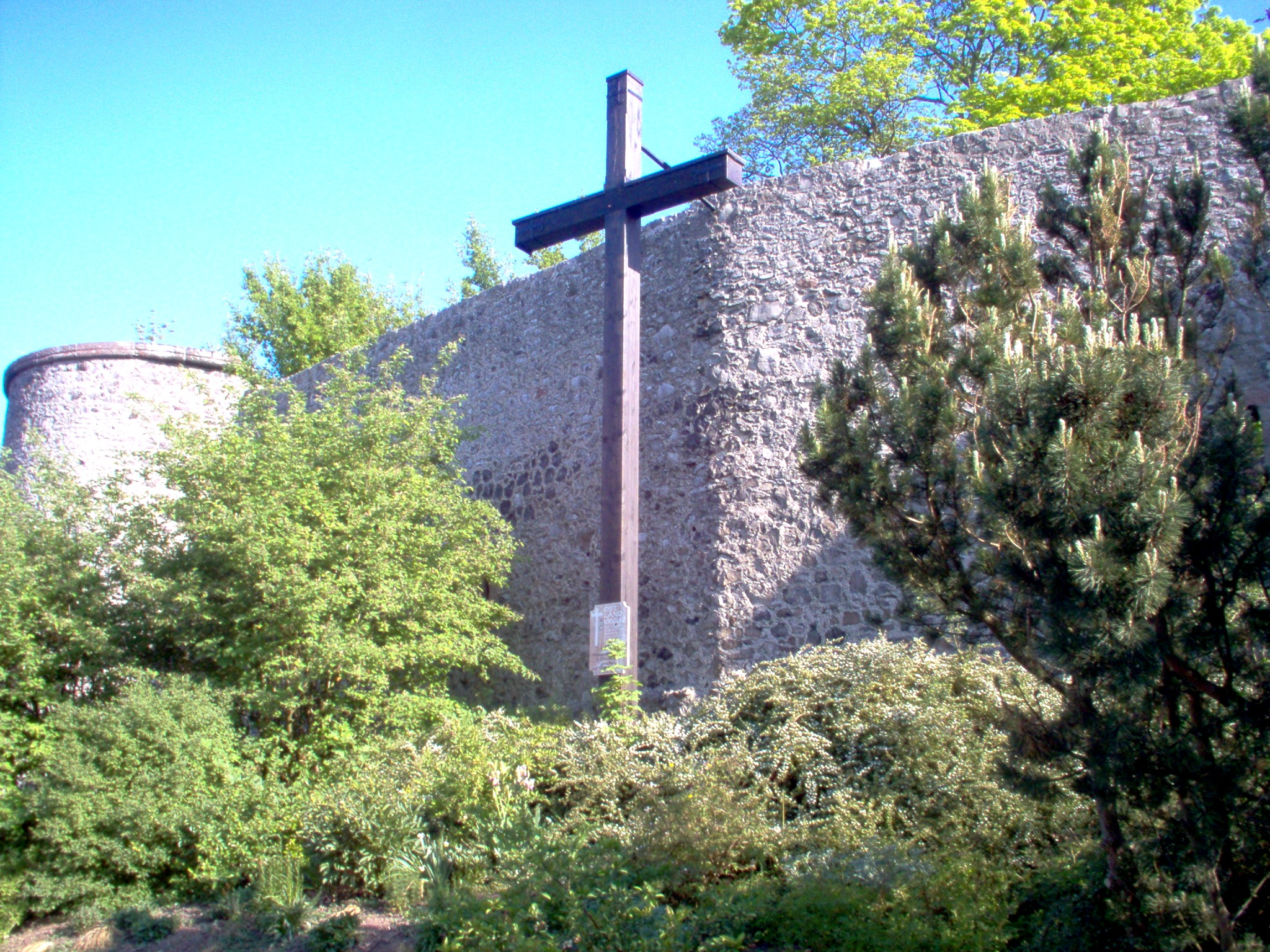 Amöneburg